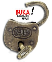 Komisi Informasi sebagai simbol Keterbukaan Informasi Publik di Indonesia